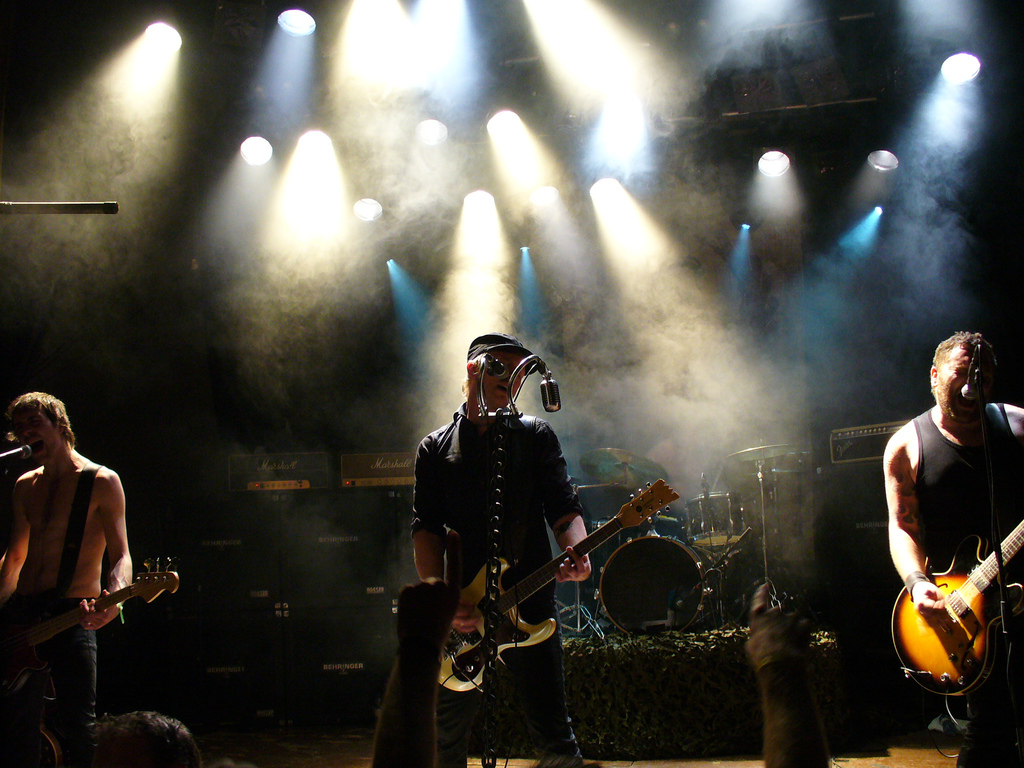 Skambankt, a Norwegian rock band